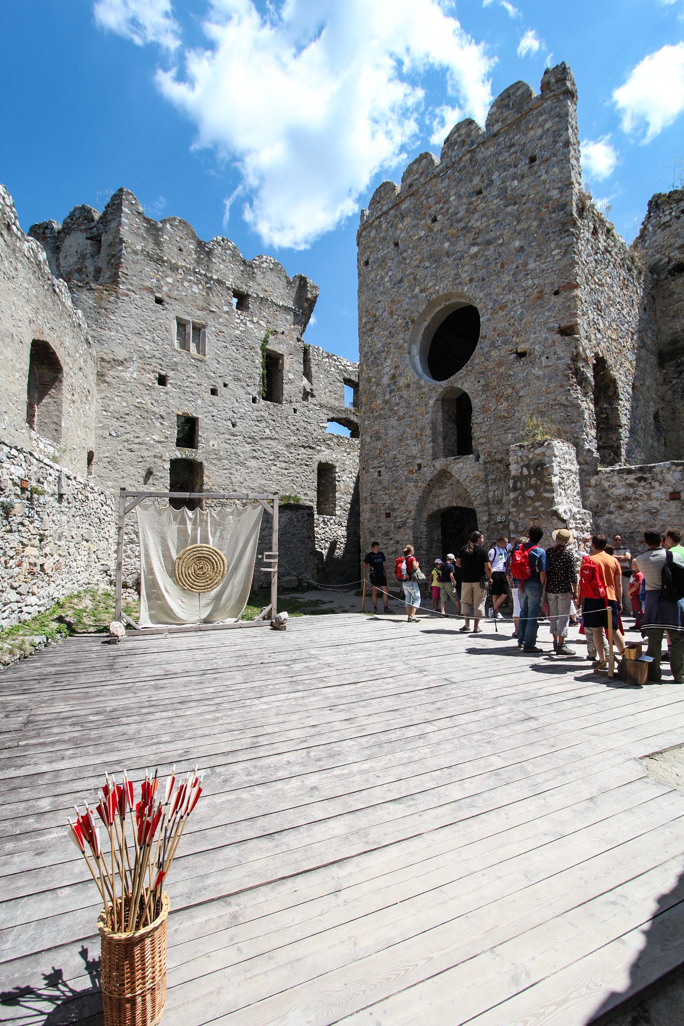 Beckov - nádvorie horného hradu s kaplnkou a palácom